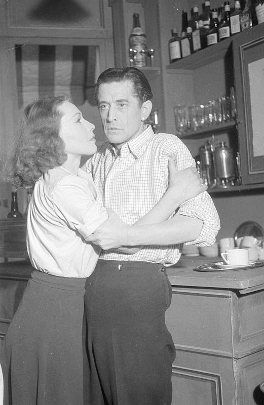 Original image description from the Deutsche FotothekSzenenbilder & Porträt Hans Söhnker (rechts) in der Rolle des Marius, Gerty Soltau (links) in der Rolle der Fanny